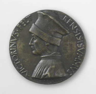 Kopfseite der Medaille mit dem Seitenprofil des Vittorio da Feltre (ca.1373-1446) - rückseitig eine Pelikandarstellung. Dadurch wird er mit der christlichen Symbolik der Nächstenliebe, wie sie im 'Physiologus' beschrieben wird, in Verbindung gebracht.